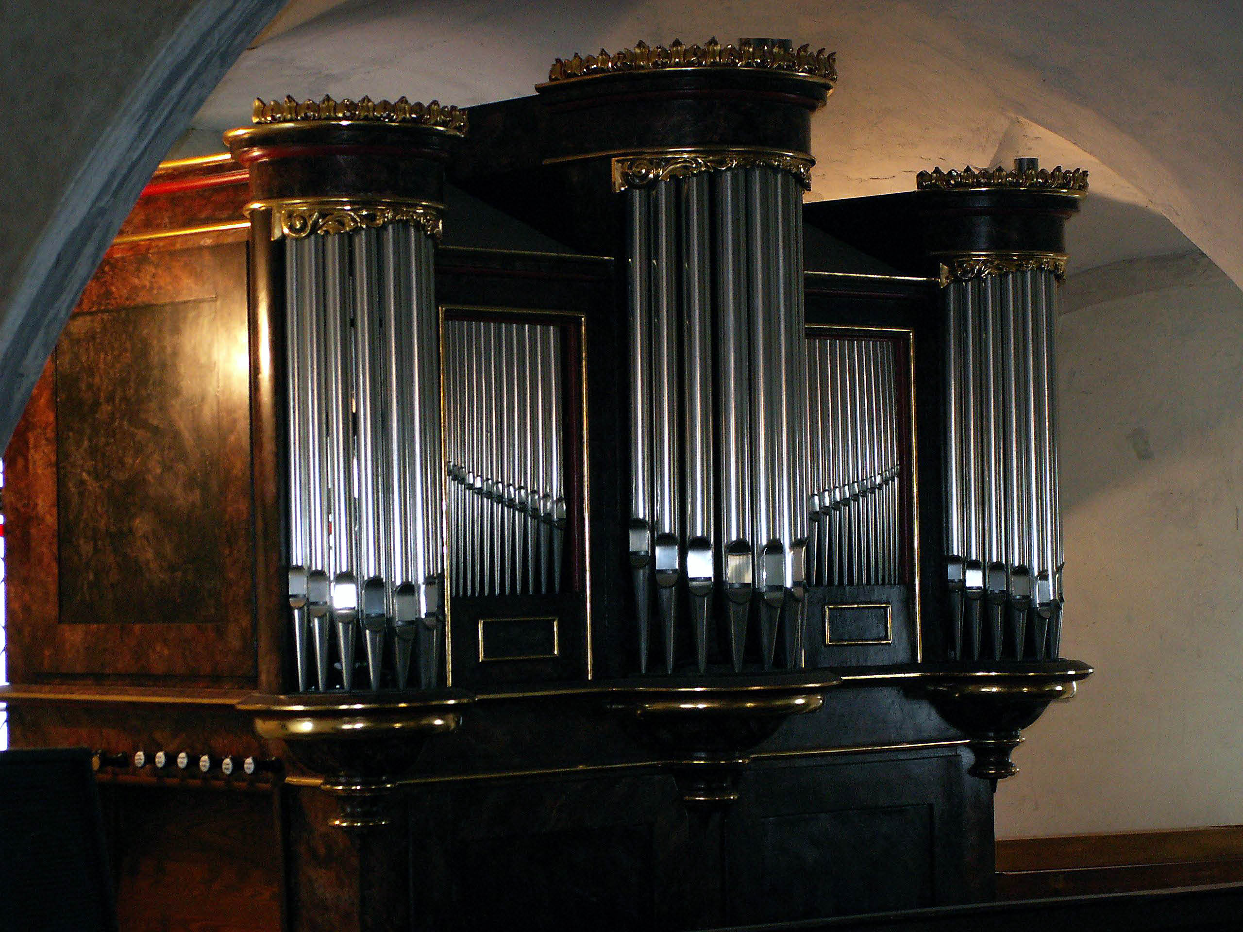 Organy Ed. Horn 1875 r.